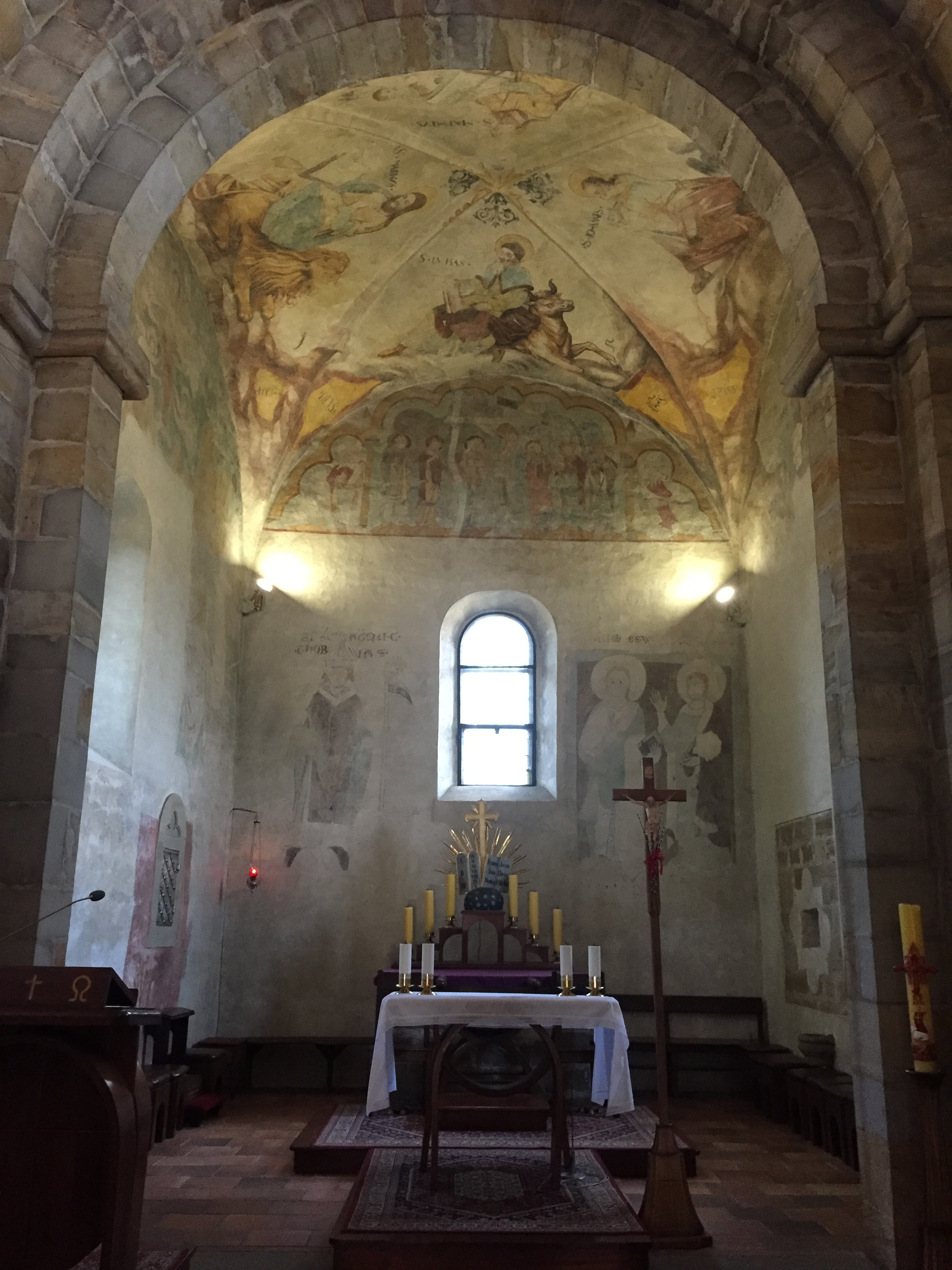 kus Vítězného oblouku, za kterým je presbytář s oltářem; na stropě původní fresky